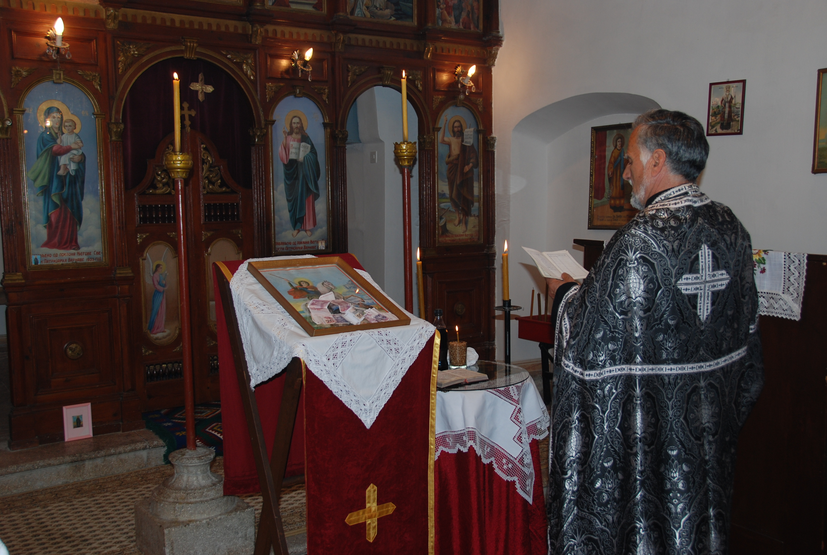 Pravoslavno bogoslužje u pravoslavnoj crkvi svetog Georgija u Kričkama kod Drniša.